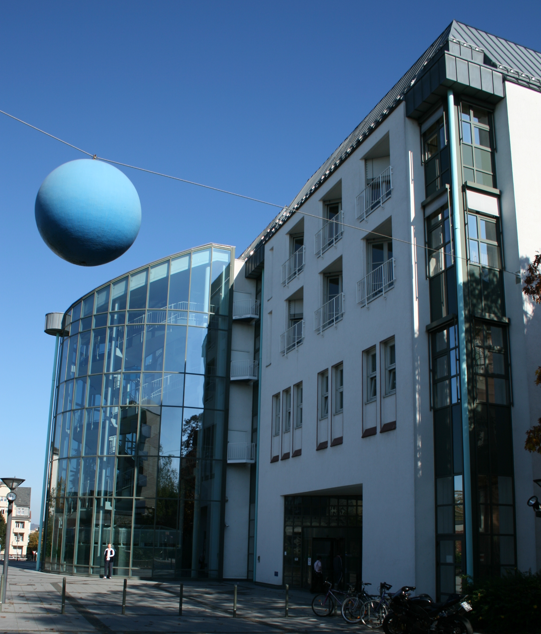 Neubau der Chirurgie im Klinikum der Universität Gießen